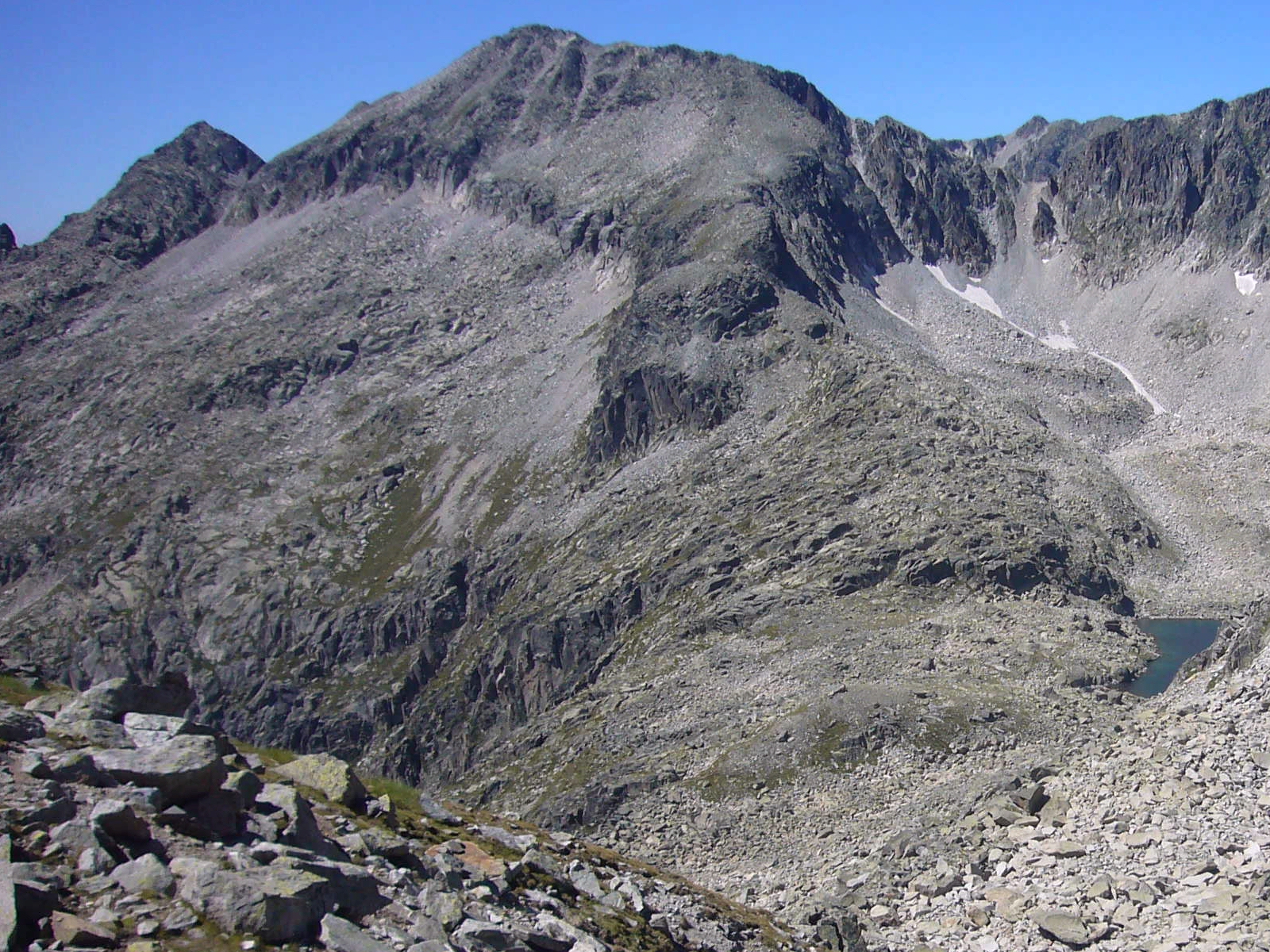 Pic de Sarradé vist des dels Estanys Gelats de Contraix; la Vall de Boí, Alta Ribagorça, Catalunya